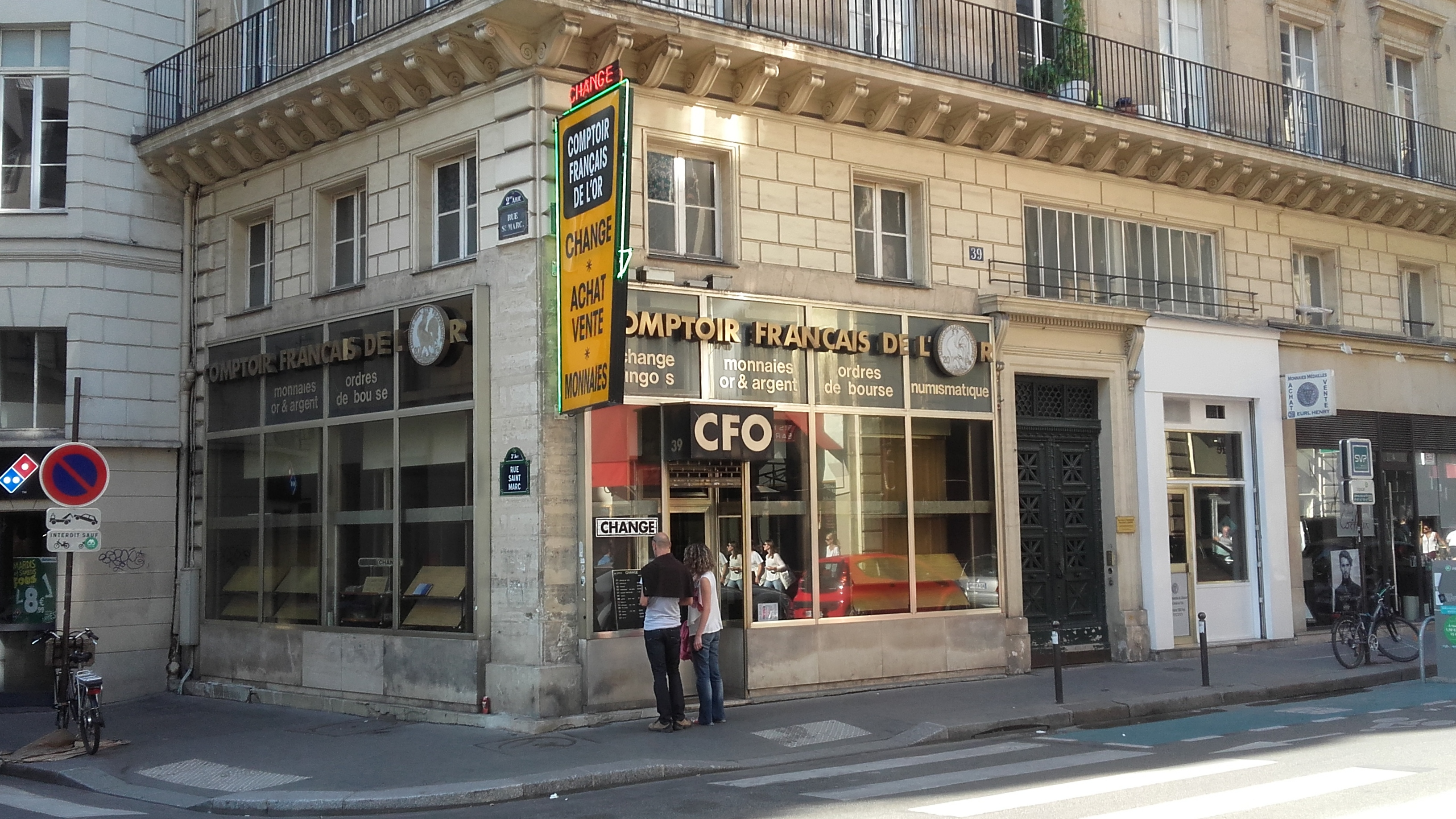 39 rue Vivienne, Paris à l'angle de la rue Saint-Marc. Boutique braquée le 25 février 1954 par Jacques Fesh